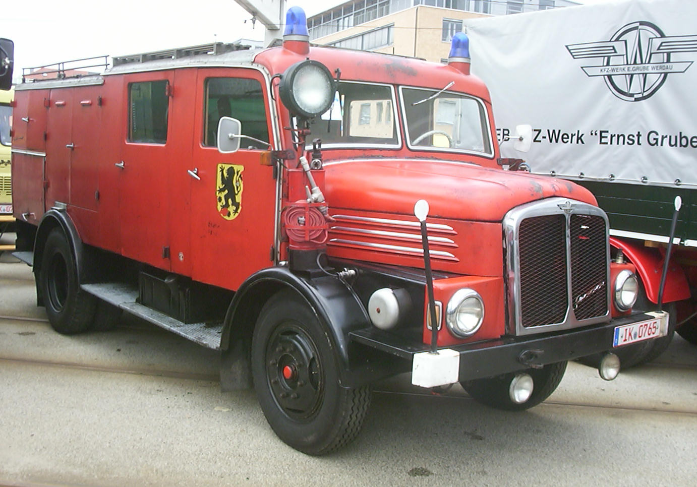 IFA S4000-1 als LF 16